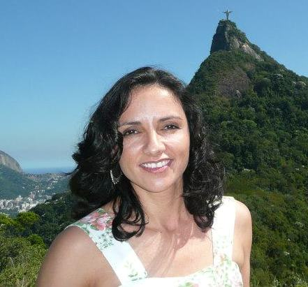 Marinalva de Almeida